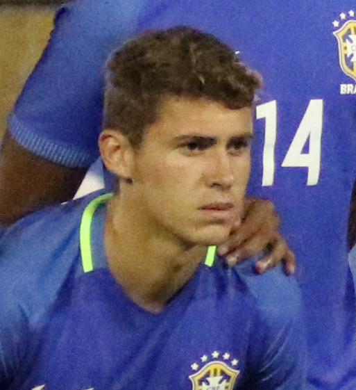 ECUADOR VS BRASIL 14 MAV